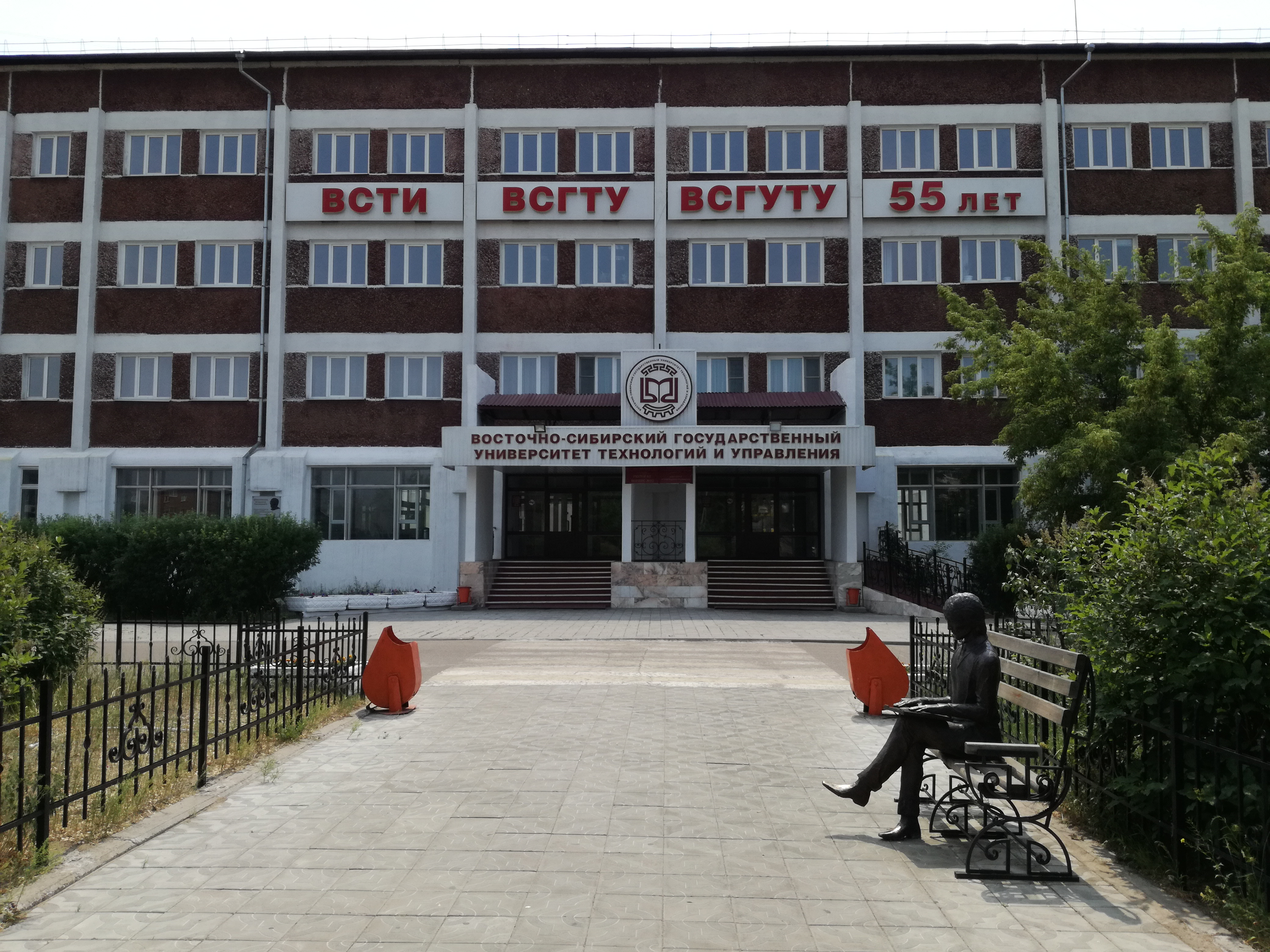 Улан Удэ